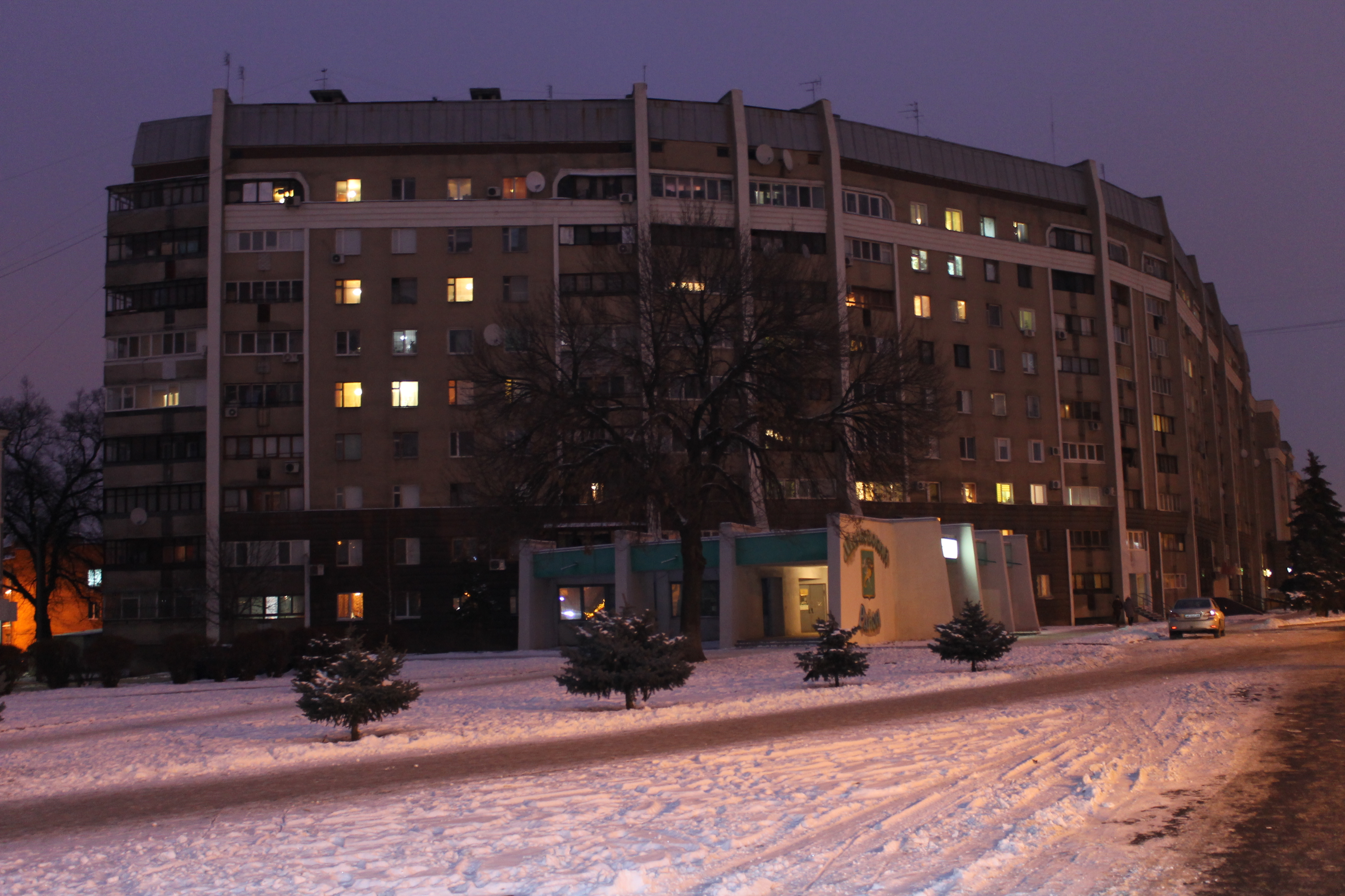 Житловий будинок в місті Харкові. За адресою проспект Московський 85